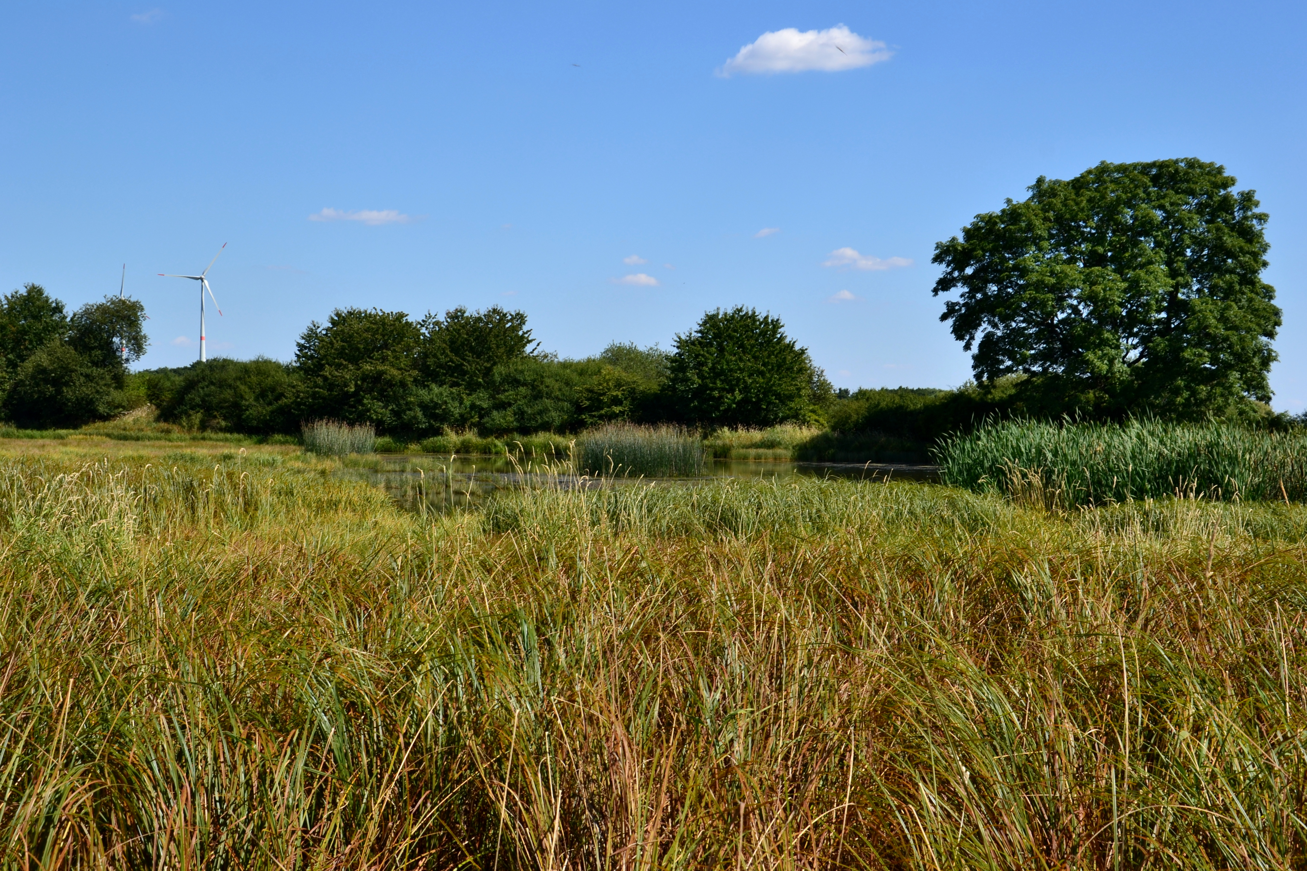 Pohled z jihozápadu